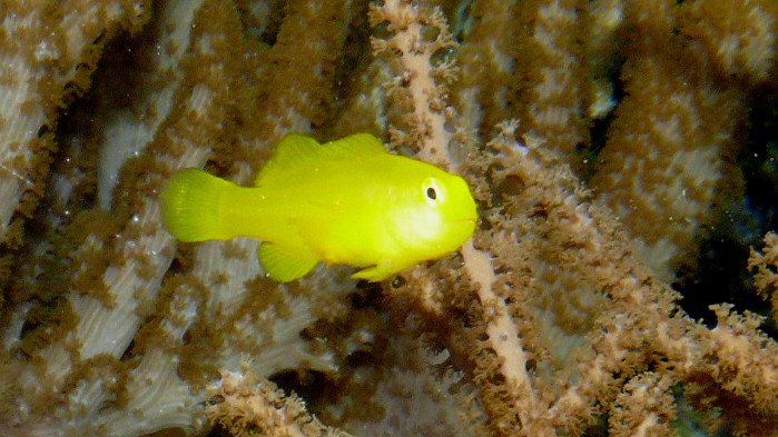 Yellow clown goby (Gobiodon okinawae)